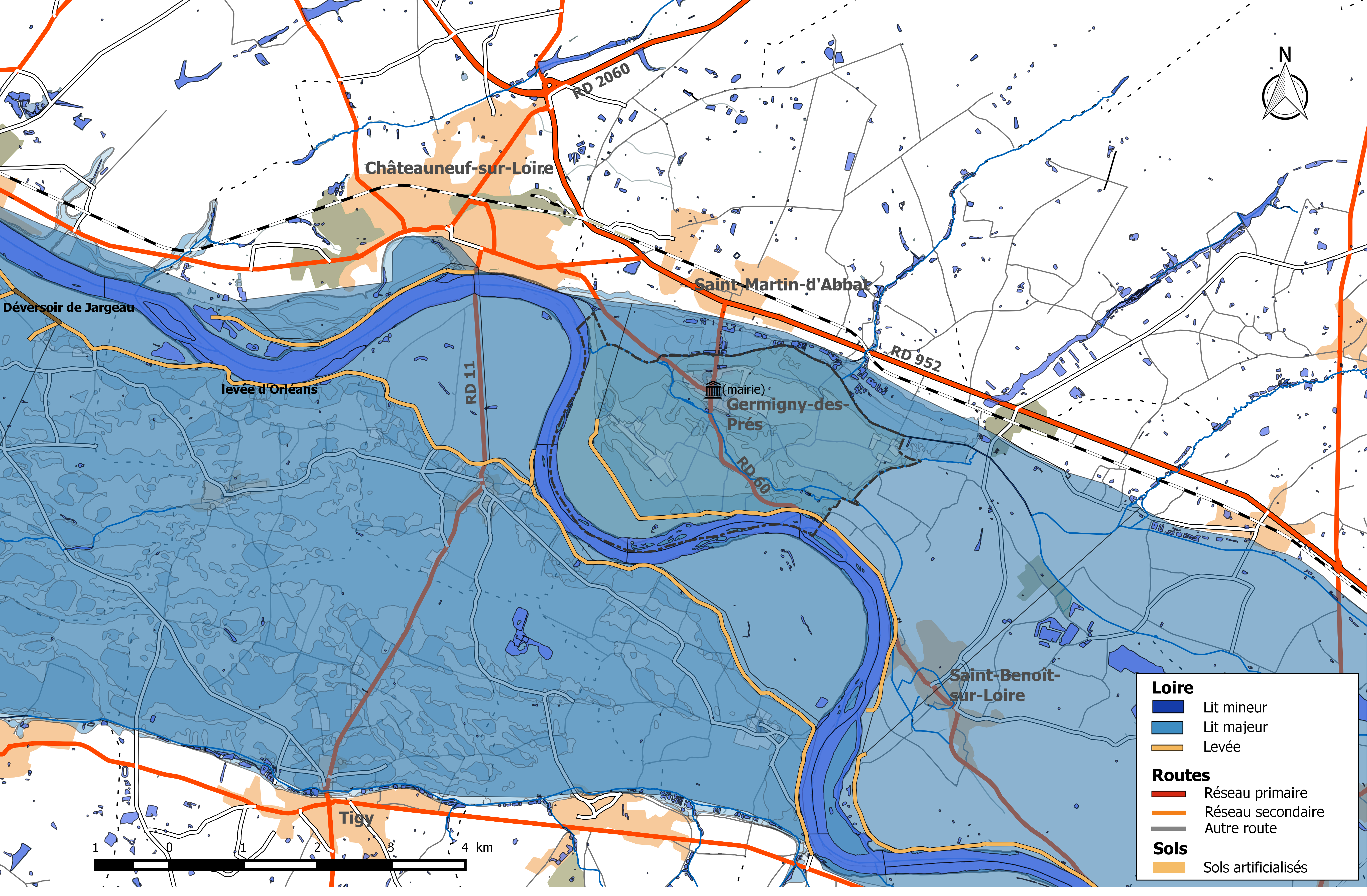 Zone inondable et réseaux hydrographique et routier de la commune de Germigny-des-Prés.